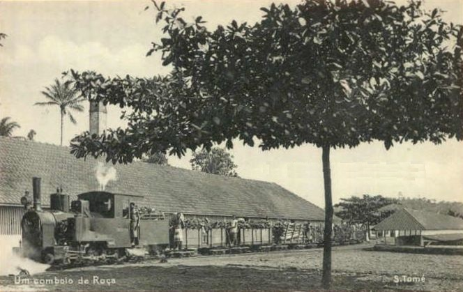 Um comboio a vapor numa Roça de S. Tomé e Principe - Roças - comboios antigos portugueses